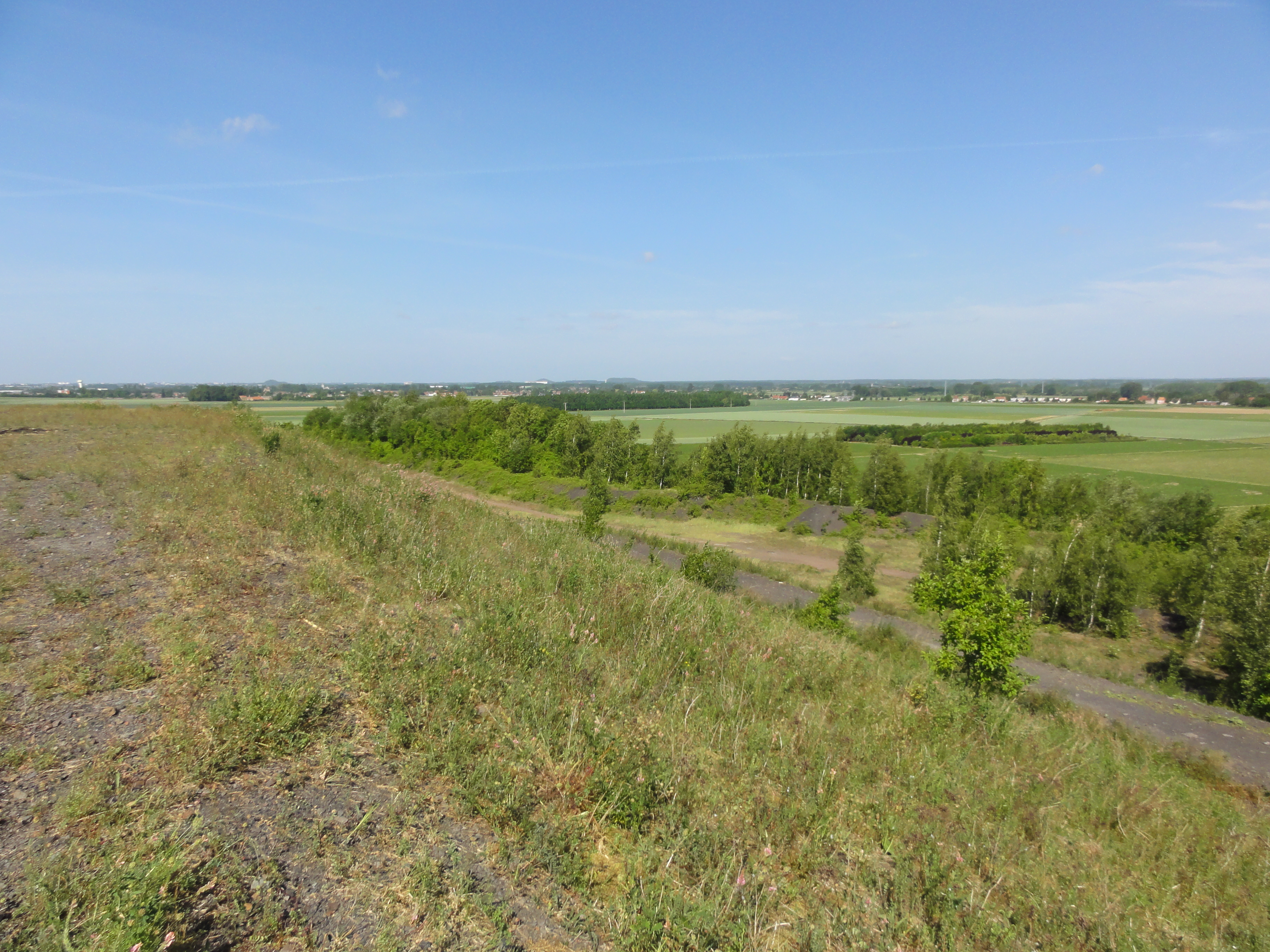 Terril n° 200 dit 2 de Crespin, Fosse n° 2 - 2 bis de la Compagnie des mines de Crespin, Quiévrechain, Nord, Nord-Pas-de-Calais, France.